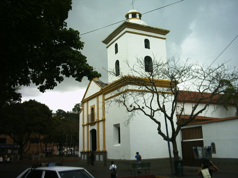 Nuestra Señora del Rosario Church